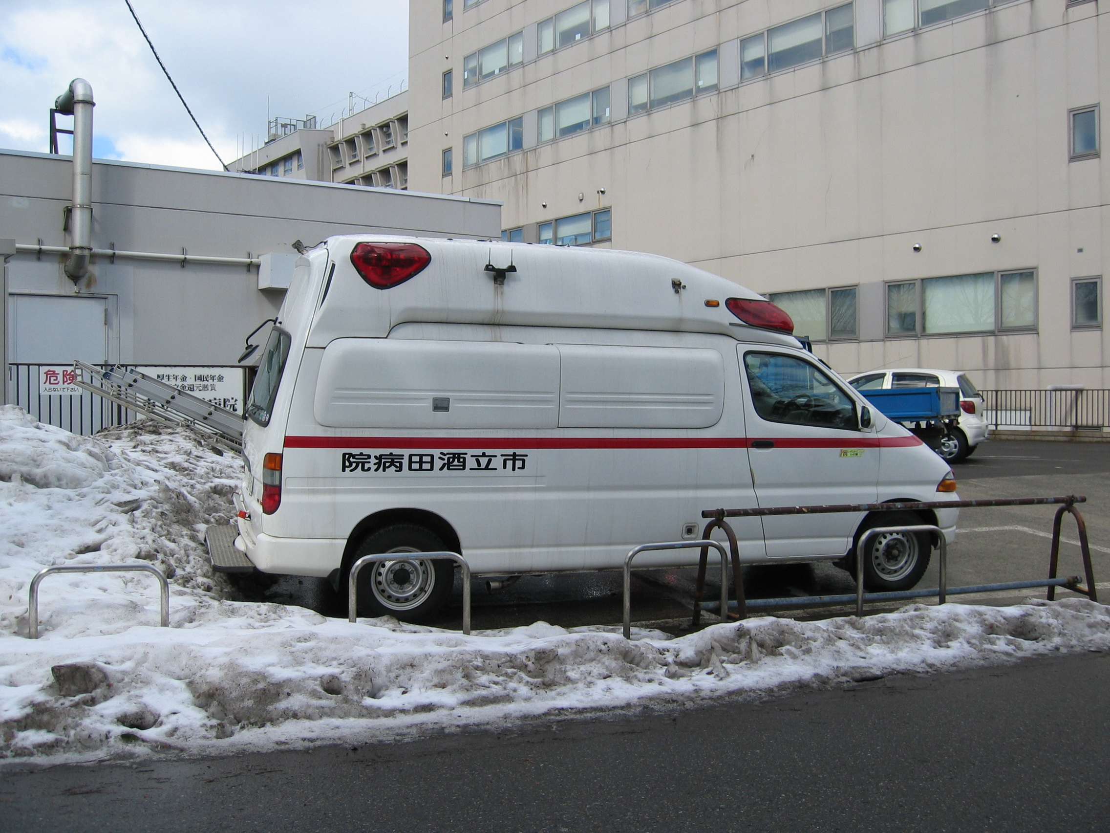 酒田市立酒田病院所有の自前救急車